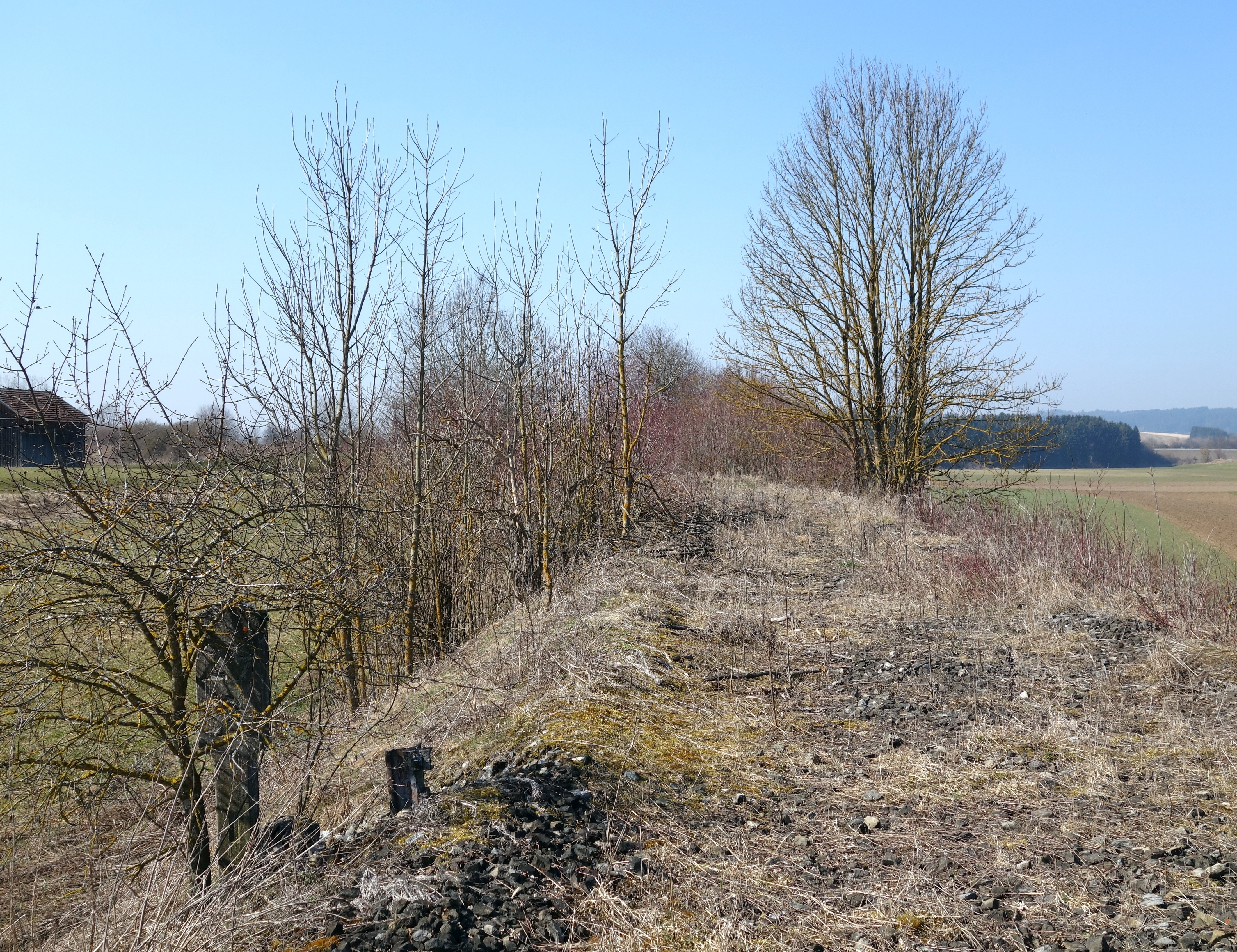 Bahndamm der aufgelassenen Strecke Kaufbeuren–Schongau nördlich des Schongauer Krankenhauses, kurz vor der Einmündung in die bestehende Strecke Landsberg am Lech–Schongau (Fuchstalbahn), mit Kilometerstein 29,2, Zustand März 2014. Der Radwanderweg "Sachsenrieder Bähnle" verläuft an dieser Stelle nicht auf, sondern südlich der Bahntrasse.an einer aussichtsreicheren Strecke.